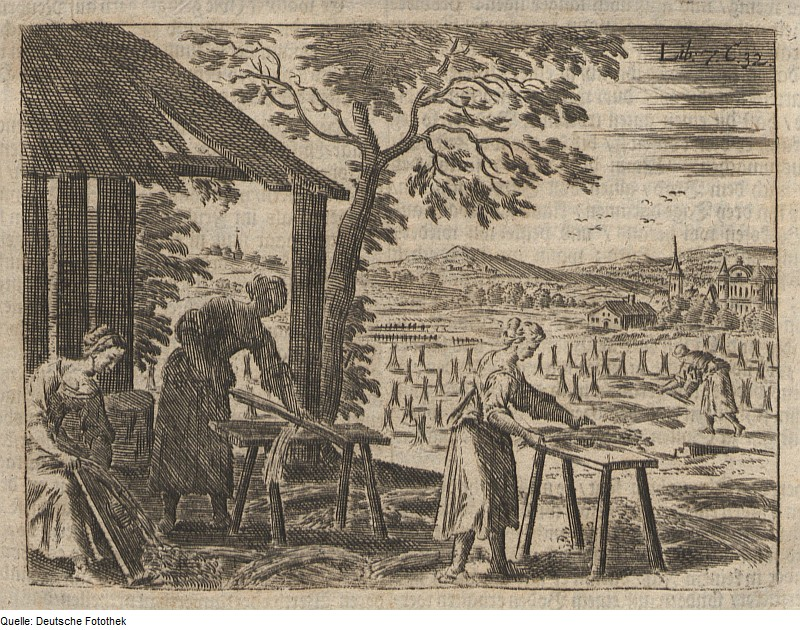 Original image description from the Deutsche Fotothek Landwirtschaft & Ackerbau & Pflanzenverarbeitung